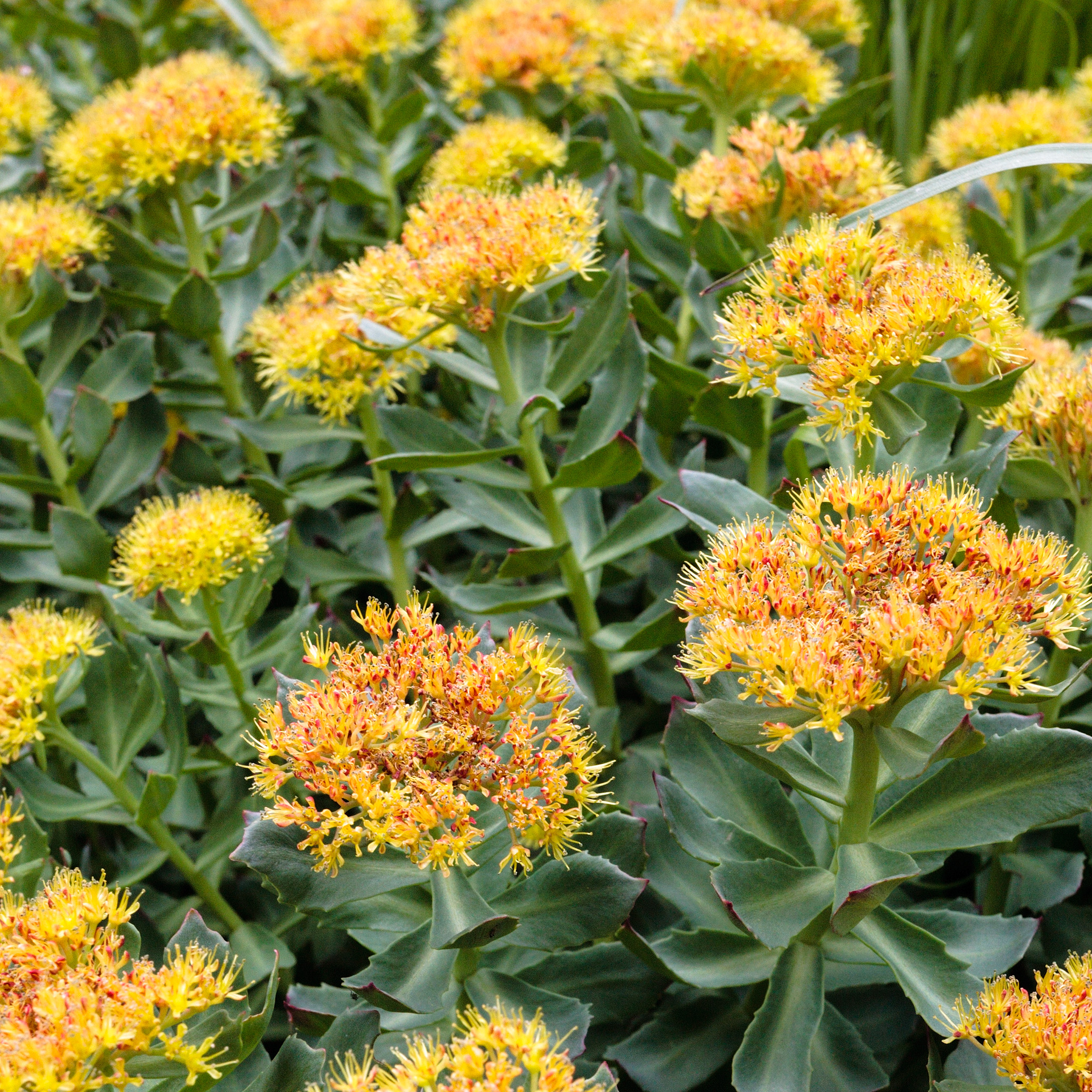 Пирин, Златовръх, сниман в Пирин планина